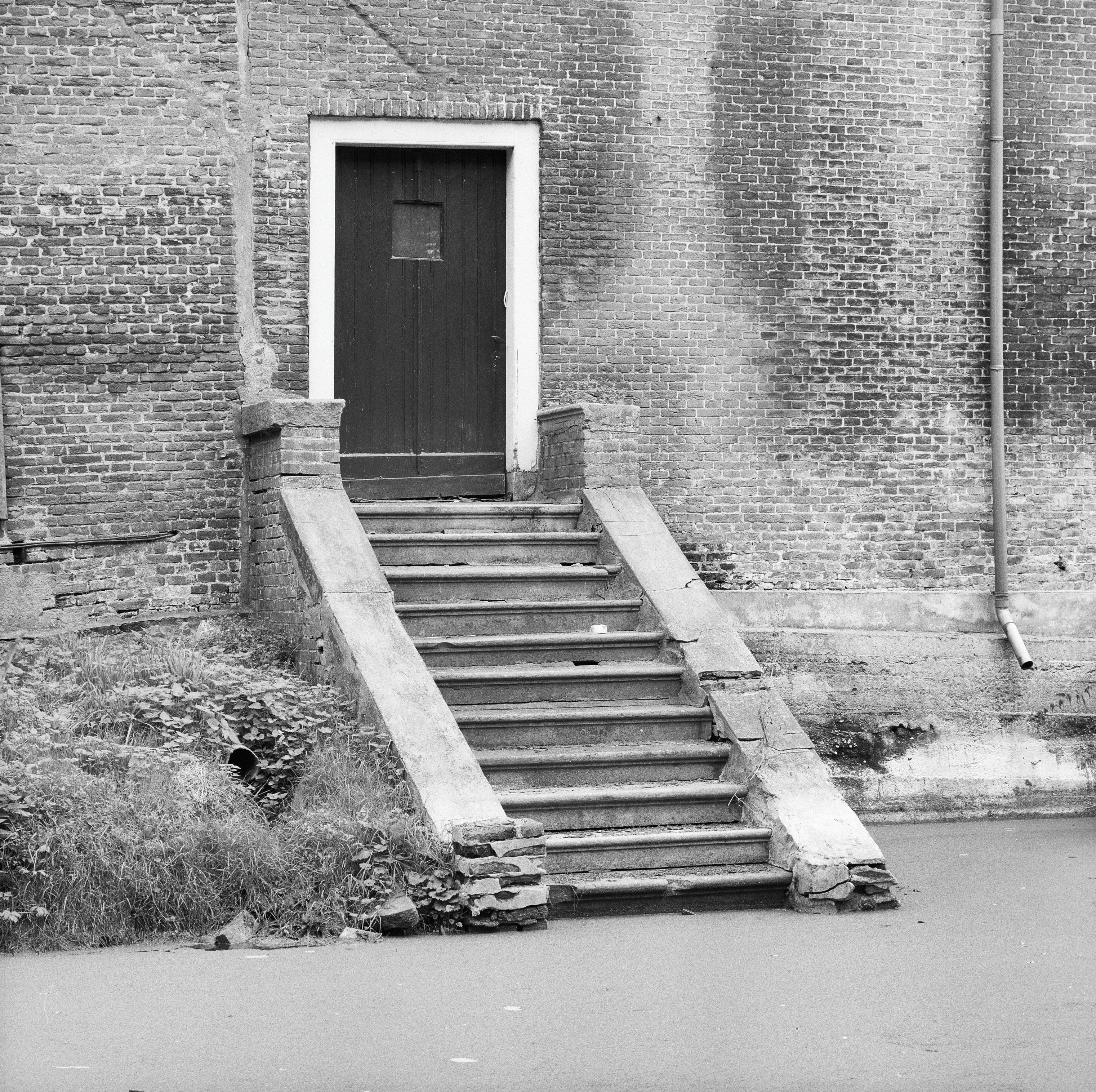 Kasteel Appeltern: trap naar slotgracht aan de noordzijde